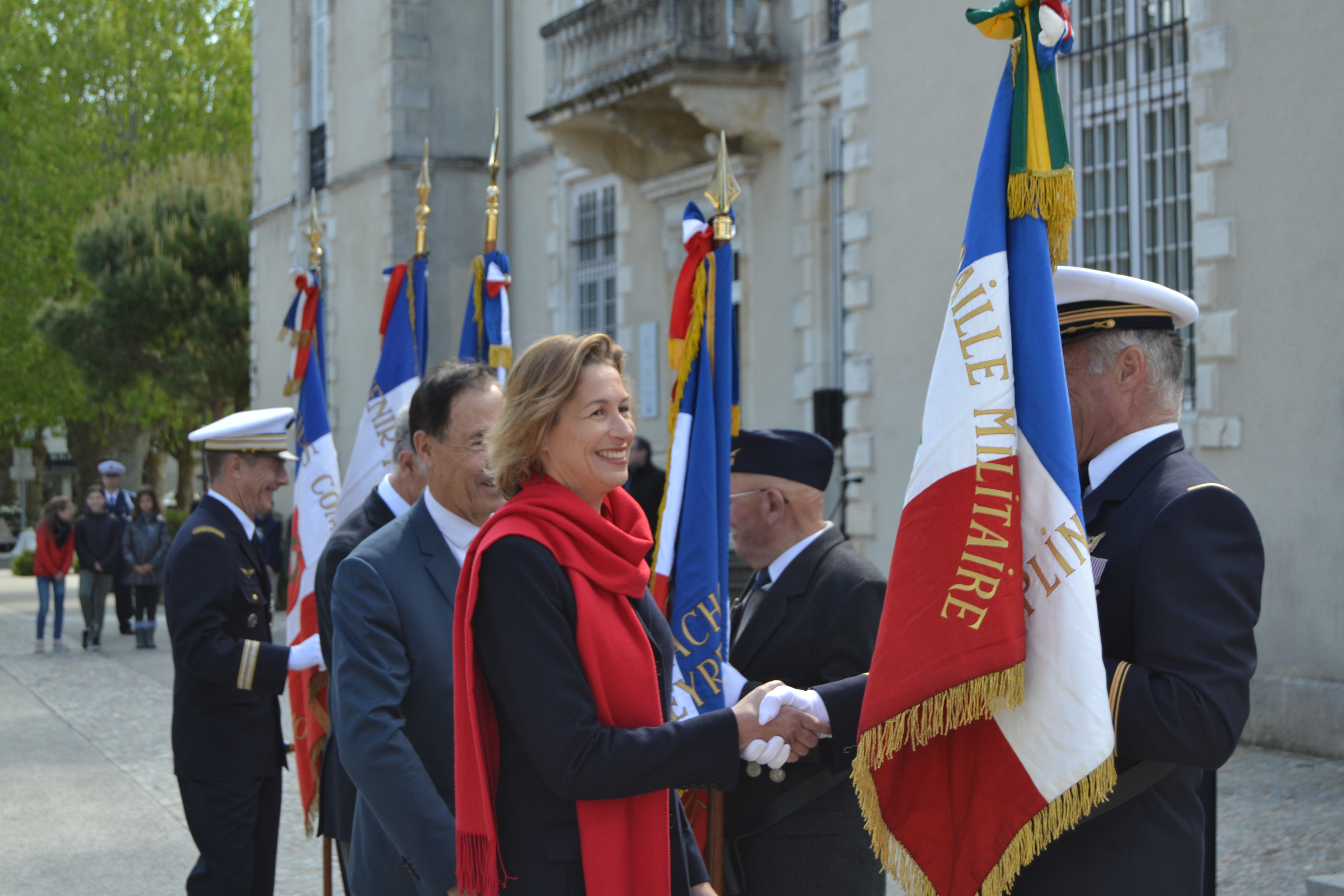 La sénatrice Nathalie Delattre félicitant les porte-drapeaux à la Teste de Buch lors de la Journée Nationale du souvenir de la déportation,dimanche 28 avril 2019.